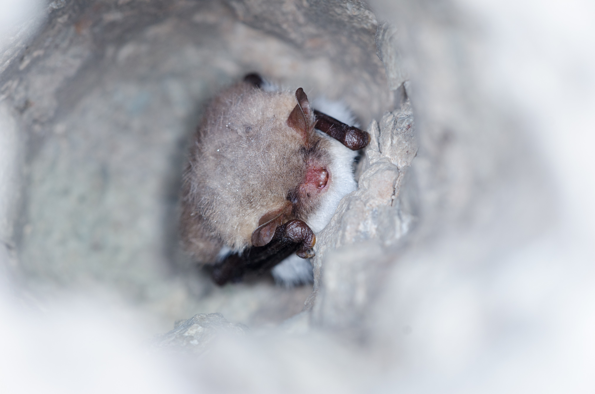 Talvituv Nattereri lendlane